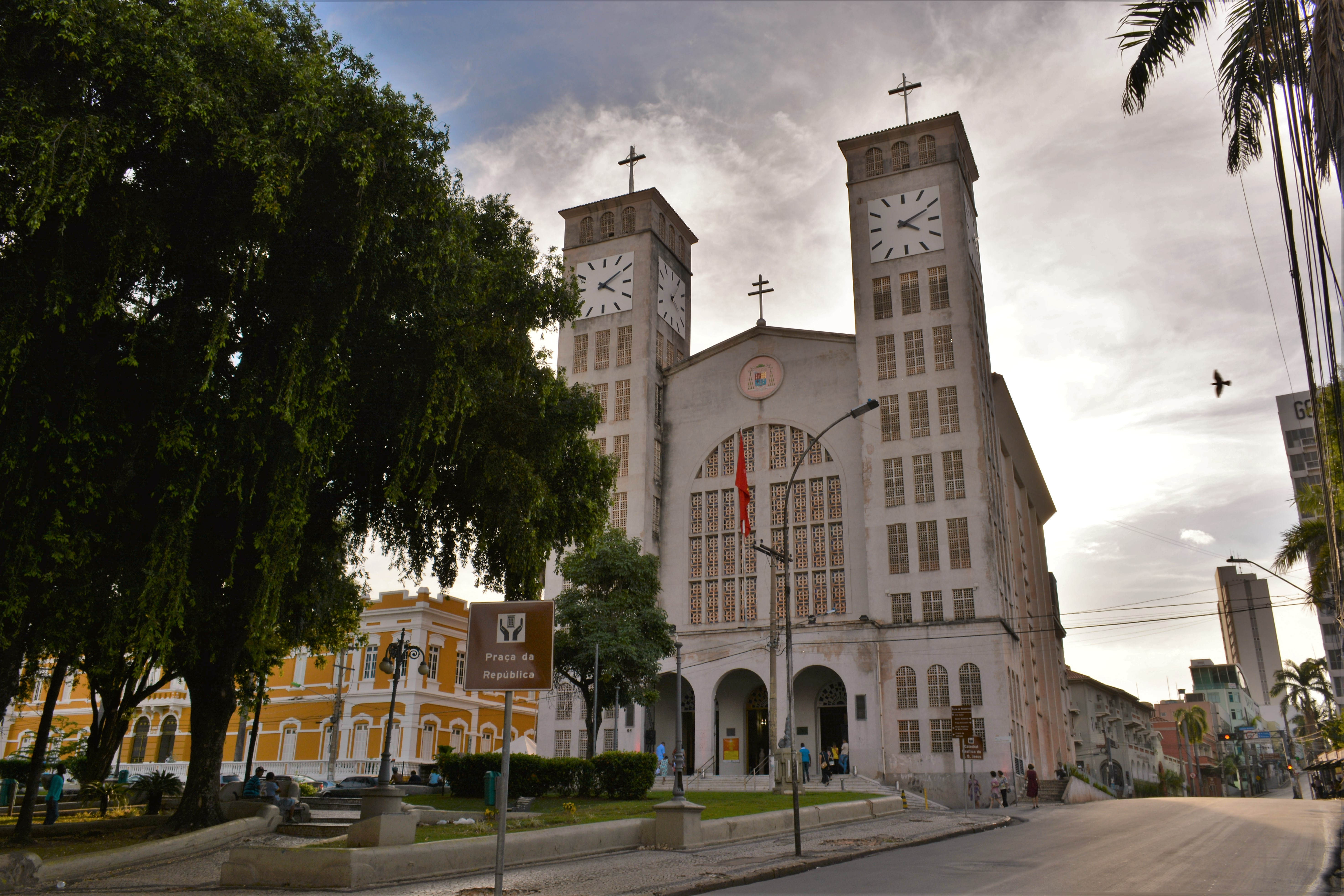 Cuiabá, MT: conjunto arquitetônico, urbanístico e paisagístico